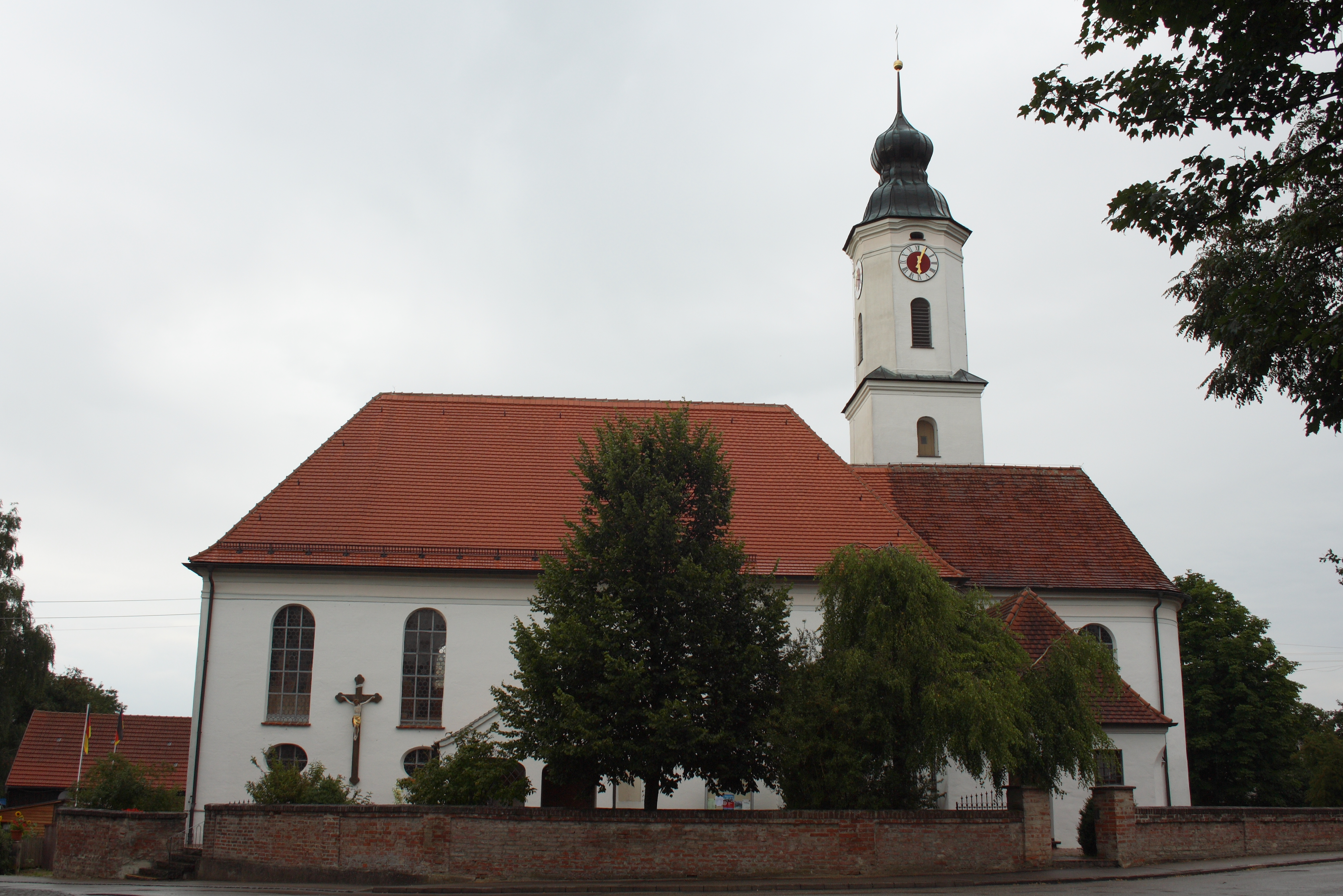 Katholische Pfarrkirche St. Nikolaus in Kutzenhausen im Landkreis Augsburg (Bayern)